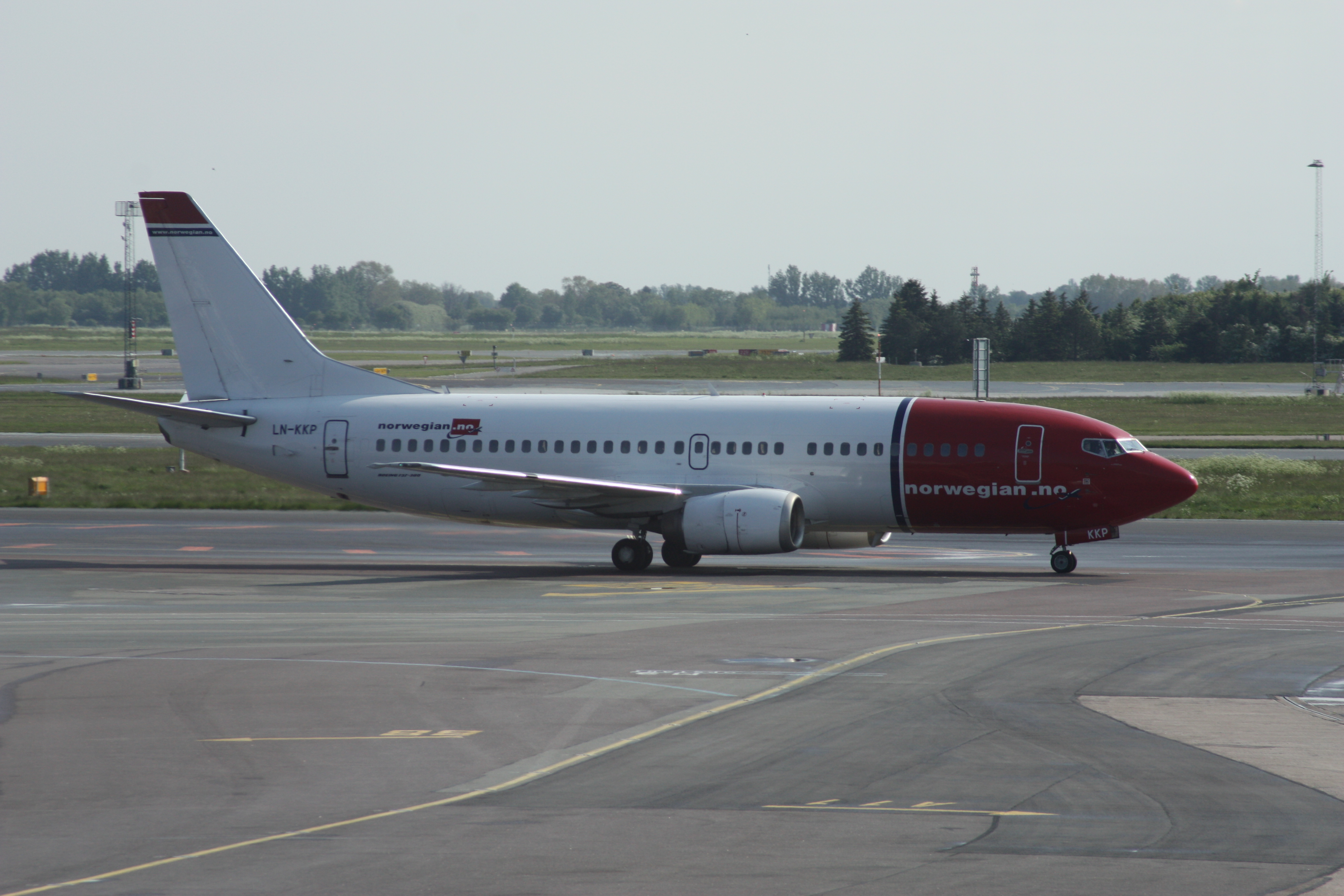 Flughafen Kopenhagen 2009